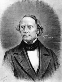 Afbeelding van Willem Nicolaas Rose (1801—1877), directeur van Gemeentewerken Rotterdam van 1839 tot 1855.